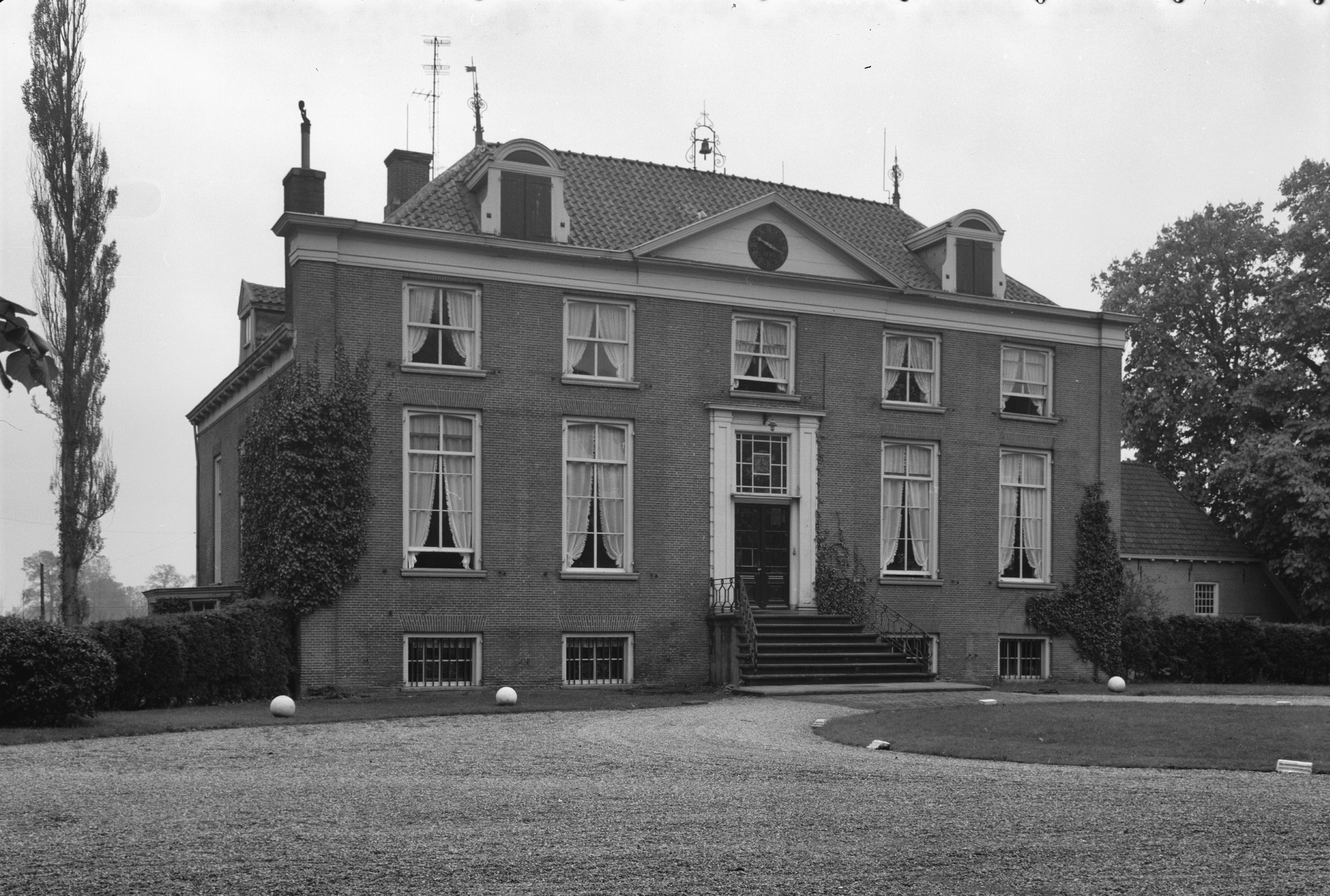 Diversen: "'t Zelle", voorzijde